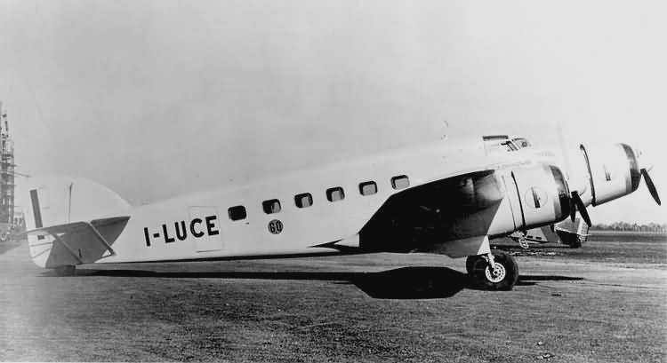 Savoia-Marchetti SM.83 profilo